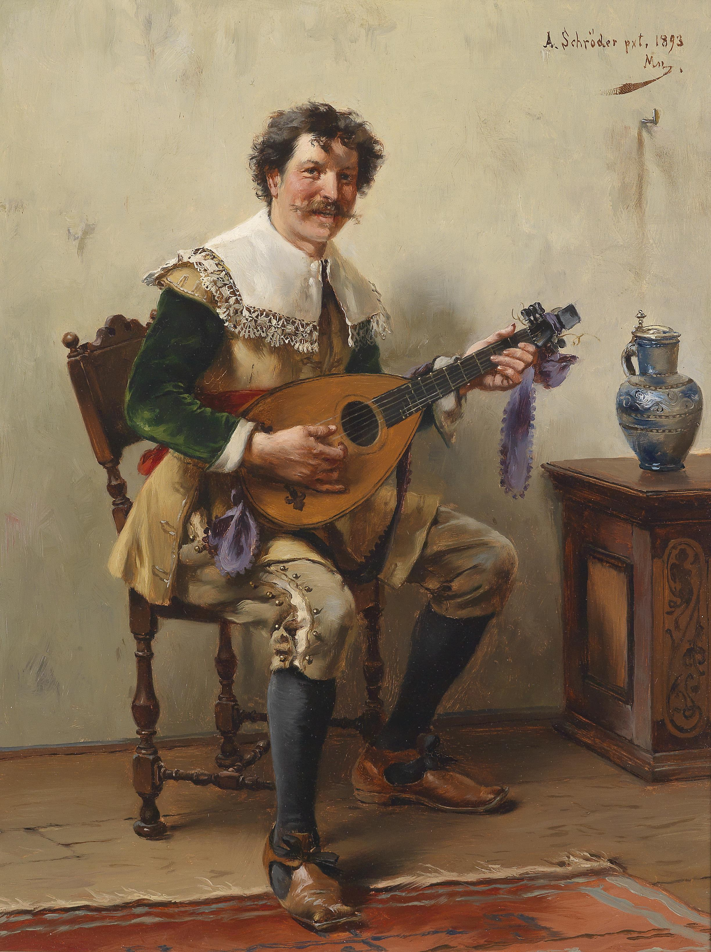 Der Lautenspieler, signiert, datiert "A. Schröder pxt. 1893 Mn", rückseitiges Etikett "Sächsischer Kunstverein in Dresden", Öl auf Holz, 33 x 25 cm